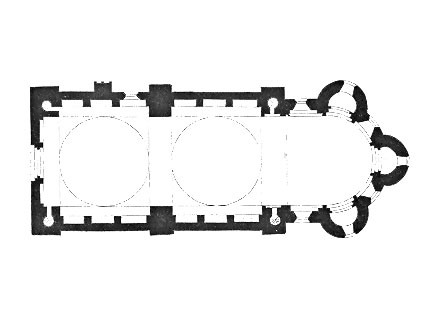 ...Nous donnons (40) le plan de cet édifice. Il se compose de deux coupoles portées sur six gros piliers, huit pendentifs et des arcs doubleaux. L'abside est voûtée en cul-de-four, et trois petites chapelles s'ouvrent dans le mur du sanctuaire..... This image comes from Dictionary of French Architecture from 11th to 16th Century (1856) by Eugène Viollet-le-Duc (1814-1879). This work is in the public domain in its country of origin and other countries and areas where the copyright term is the author's life plus 100 years or fewer. This work is in the public domain in the United States because it was published (or registered with the U.S. Copyright Office) before January 1, 1925. This file has been identified as being free of known restrictions under copyright law, including all related and neighboring rights.